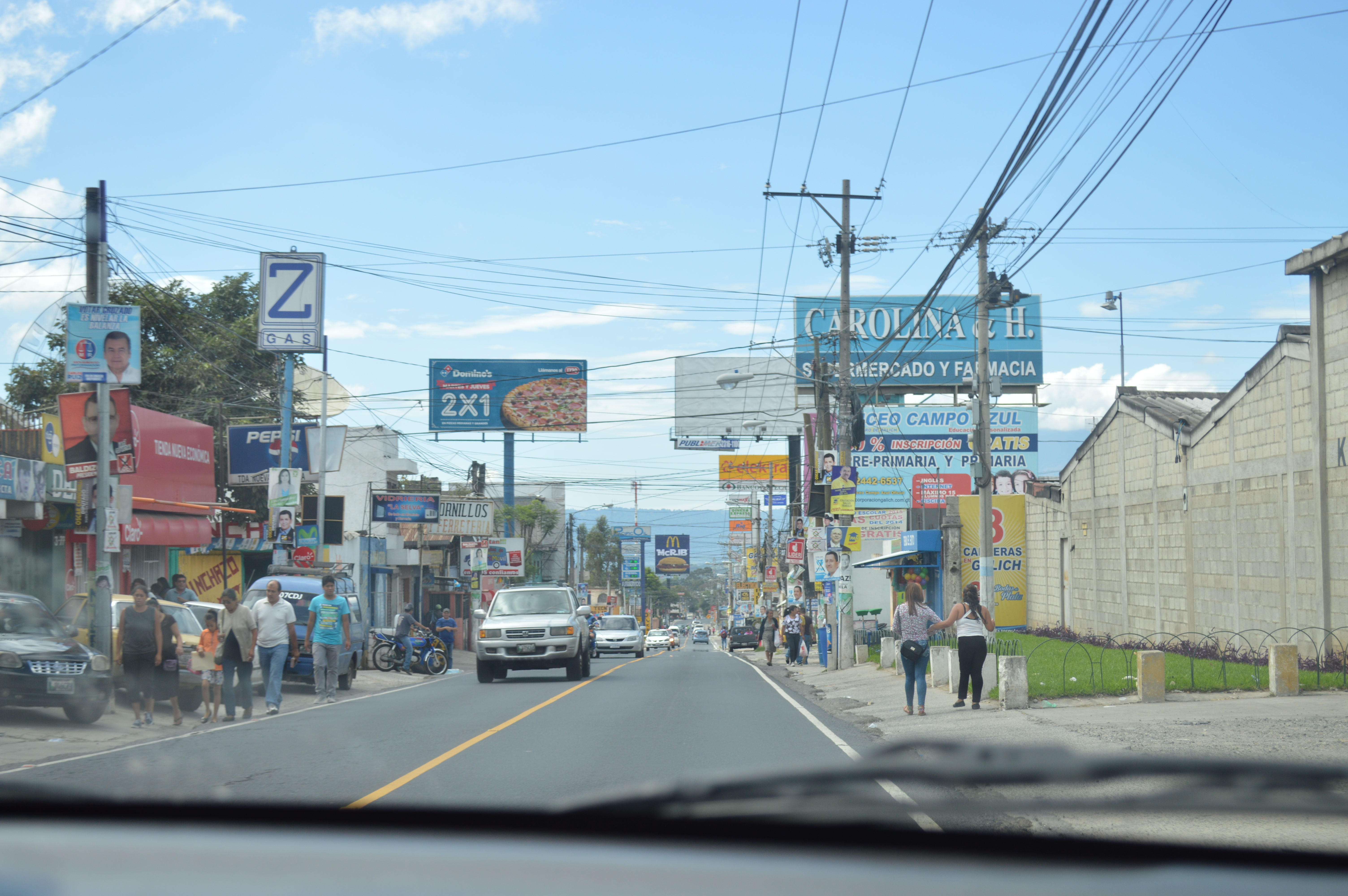 Avenida principal de la aldea cerca del la 4ta calle; Boca del Monte, Guatemala